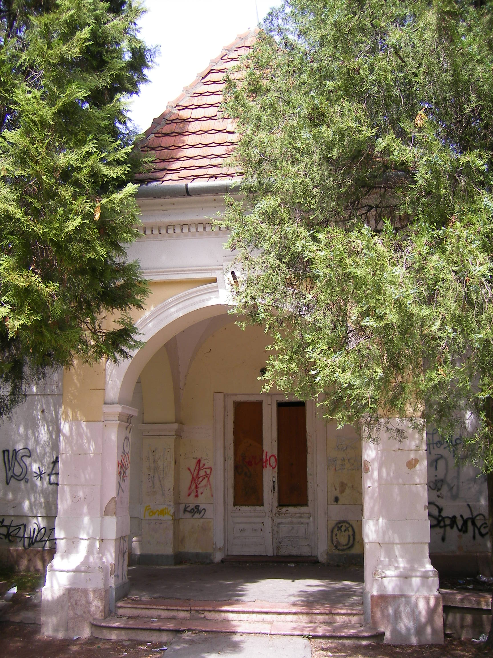 Bagota - régi kúria a parkban